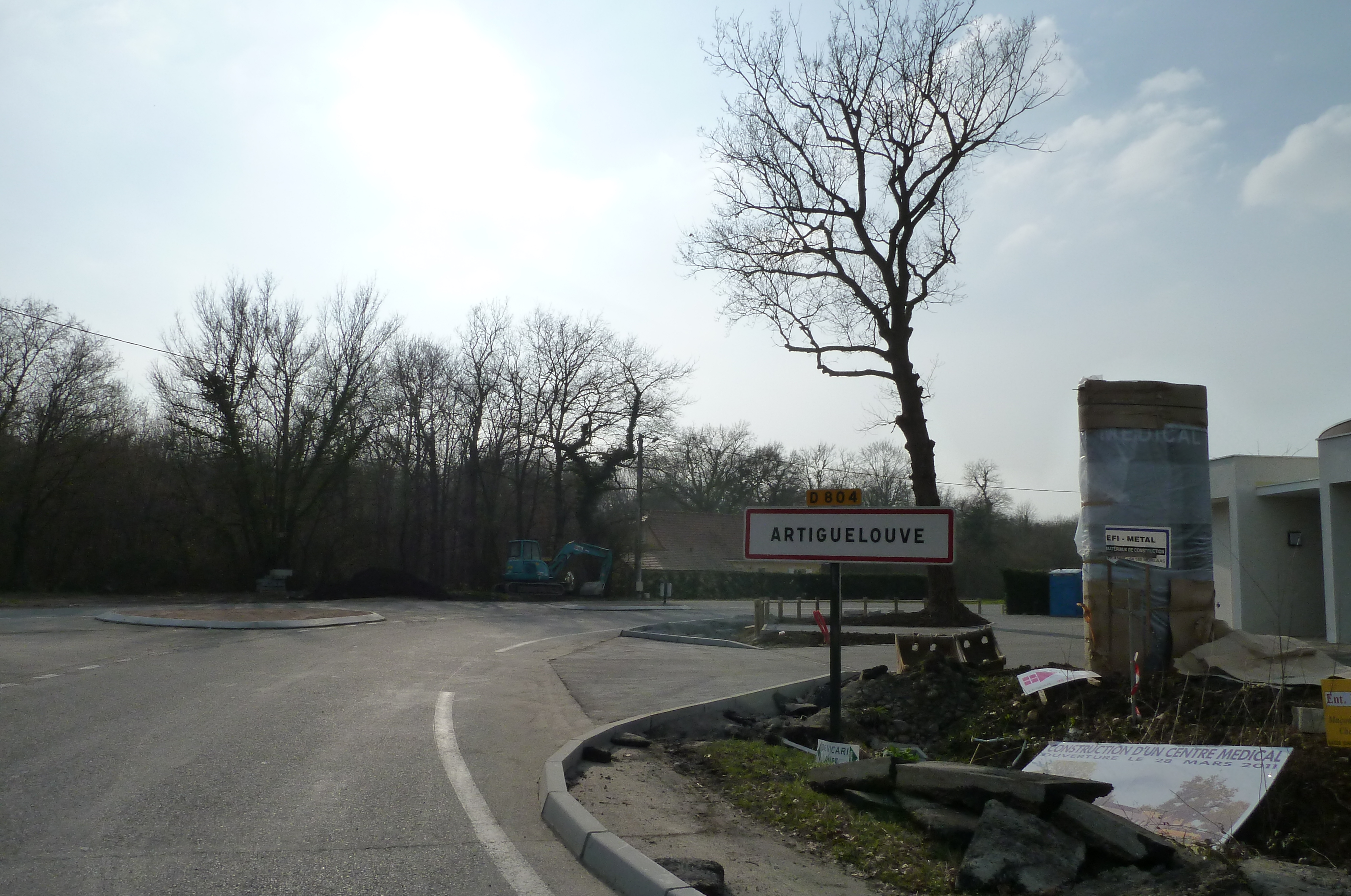 Entrée dans Artiguelouve